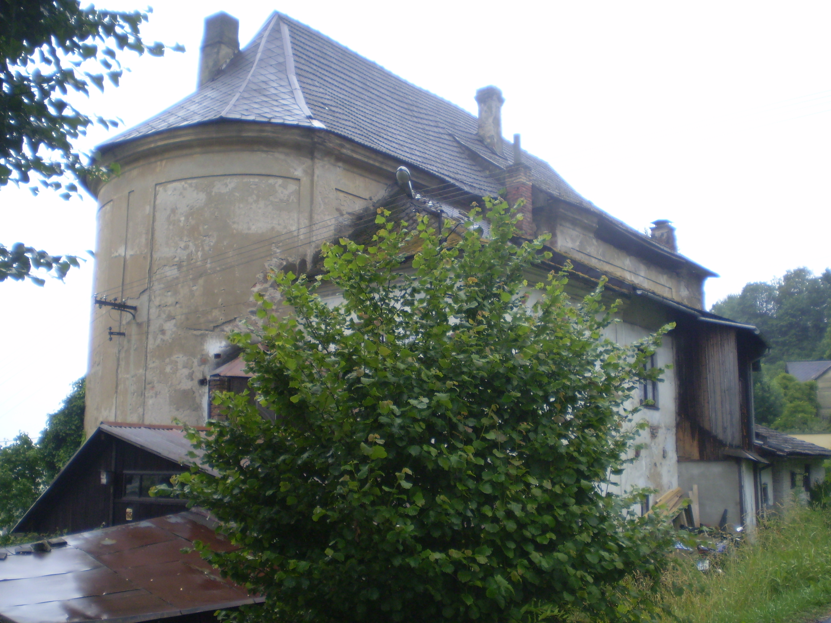 Bývalá kaple sv. Matouše